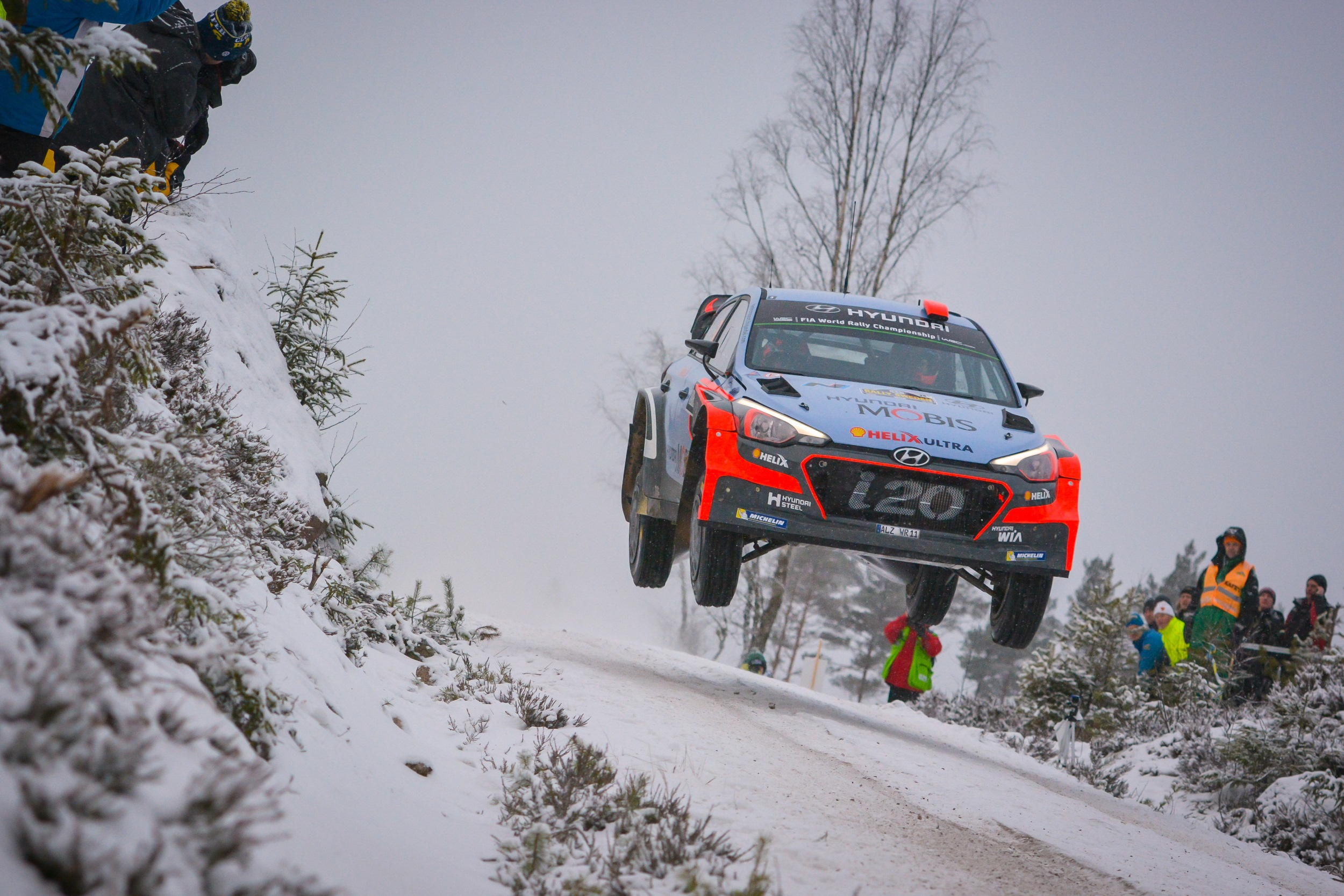 Dani Sordo podczas Rajdu Szwecji 2016